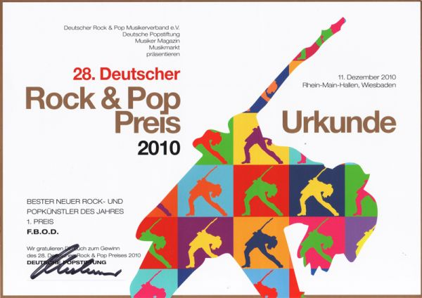 Urkunde Deutscher Rock & Pop Preis 2010 - FBOD